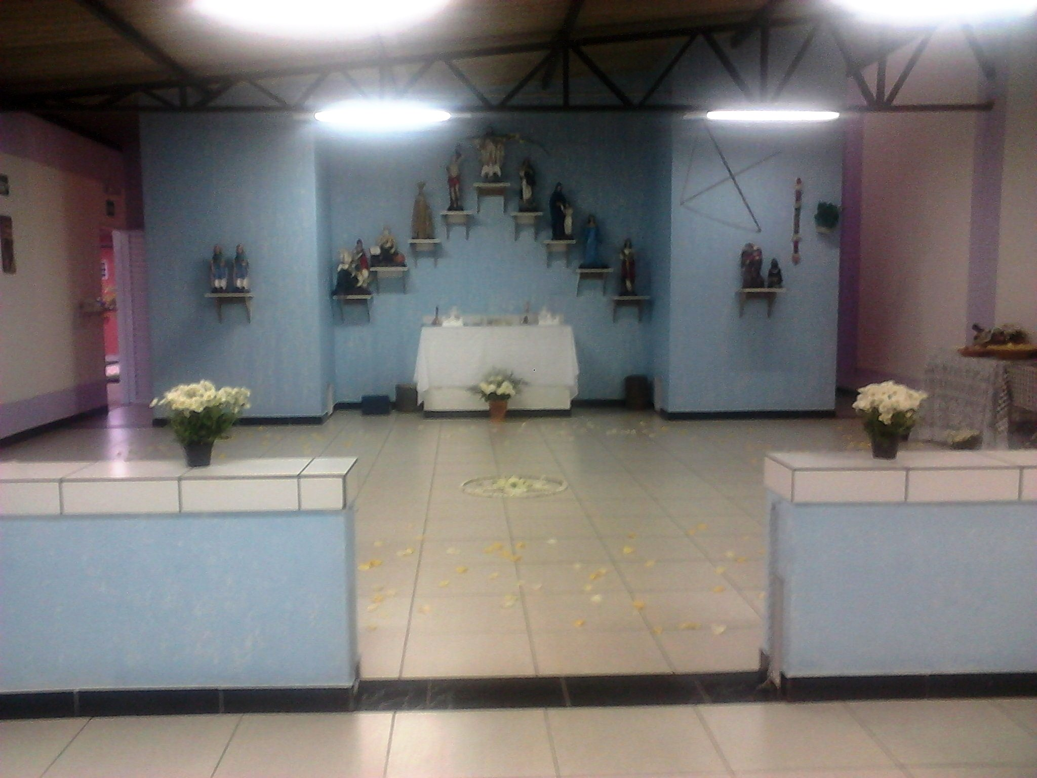 Vista do congá finalizado